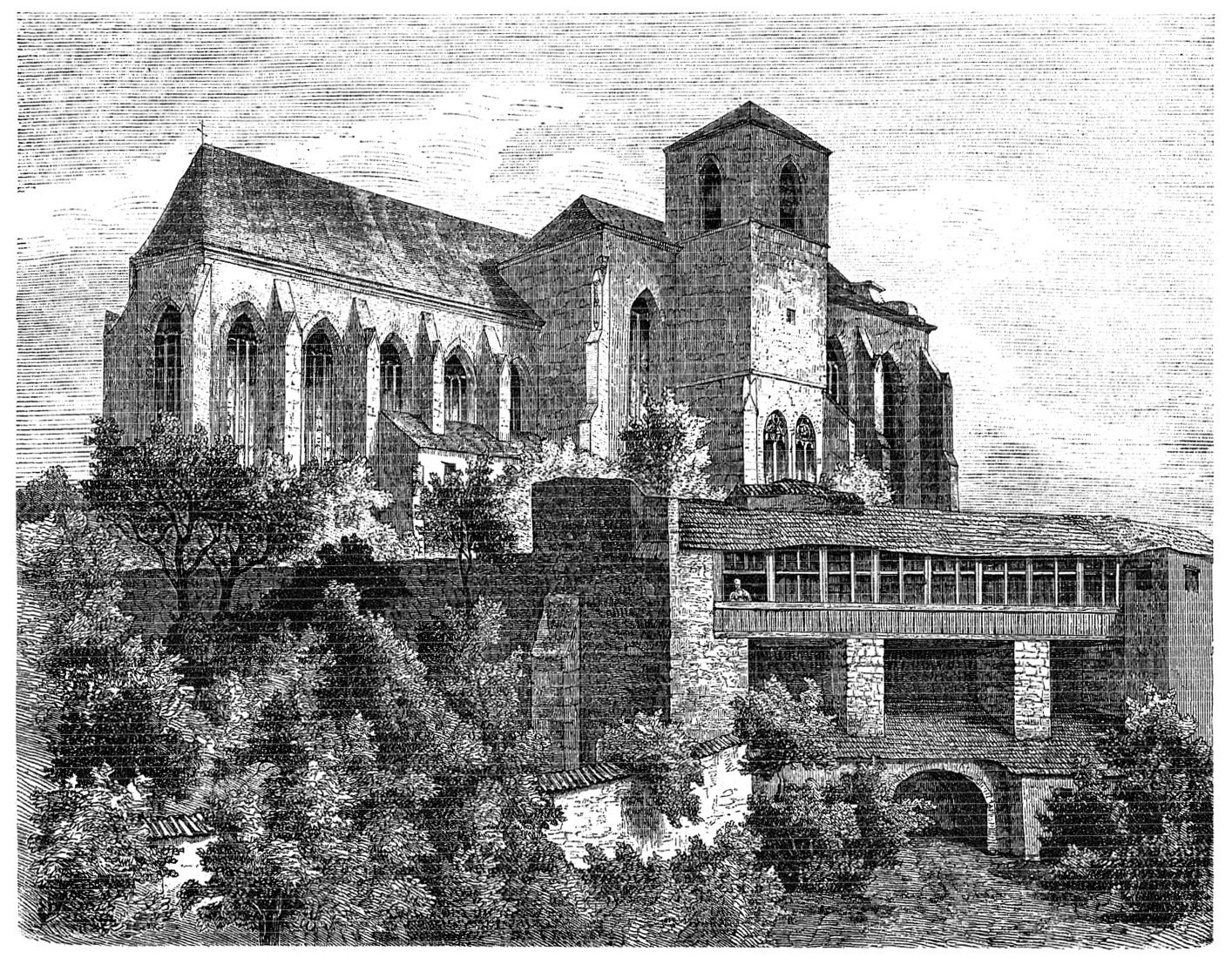 Vyobrazení katedrály sv. Petra a Pavla v Brně v časopise Světozor v roce 1874, číslo 28, strana 328. Nakreslil Edv. Harold.